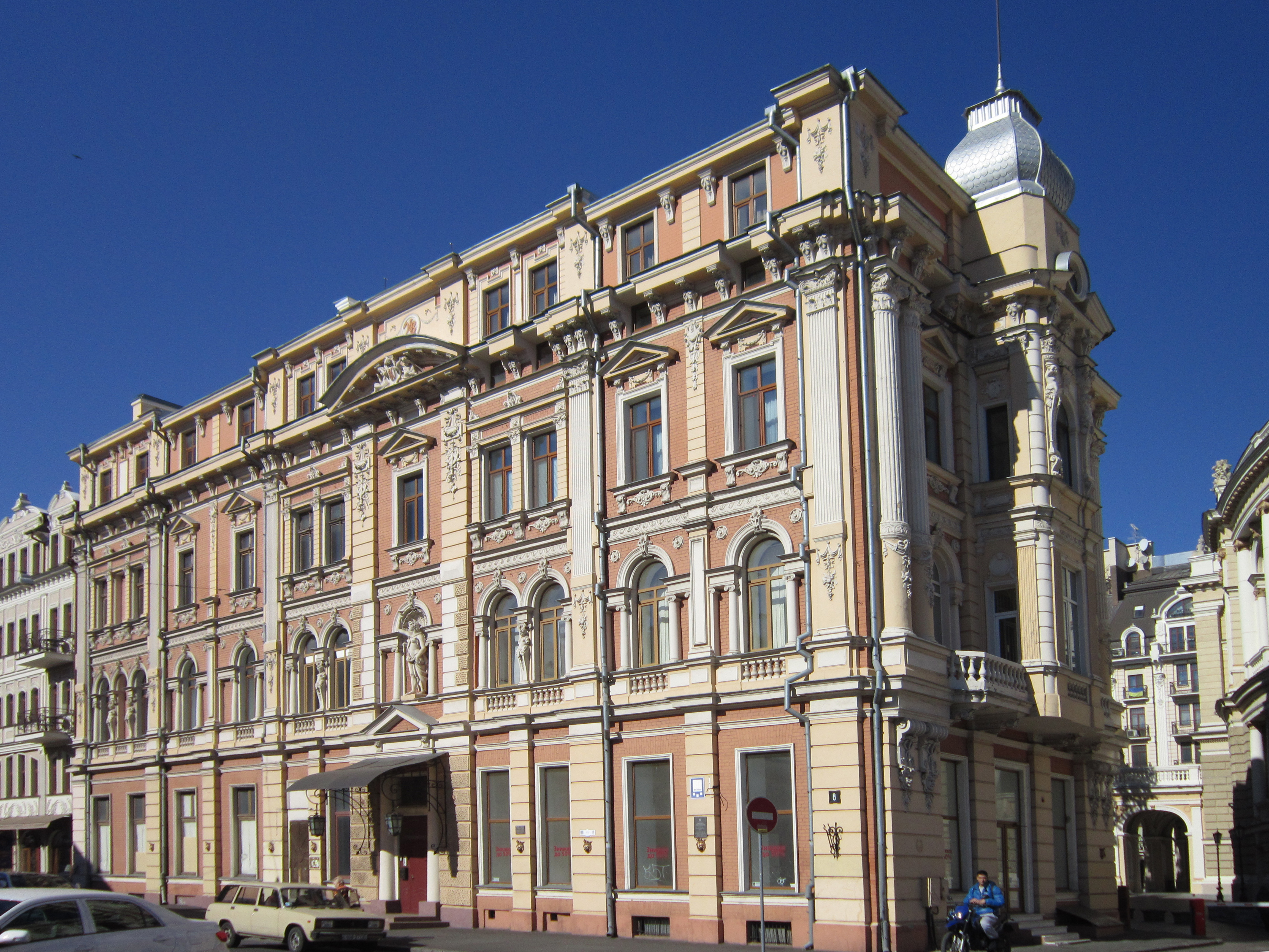 Будинок житловий Навроцького, в якому містилась редакція газети "Одесский листок", де працювали В. Навроцький - редактор та власник газети та Влас Дорошевич журналіст, критик, та фельєтонист, Одеса, Ланжеронівська вул., 8 - Пале-Рояль